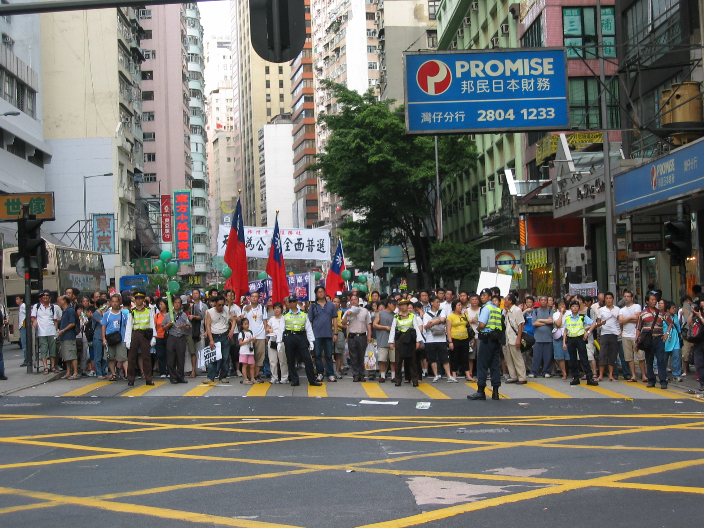 中文（香港）: 香港灣仔軒尼斯道，參與2006年七一大遊行的人群舉起三面中華民國國旗。